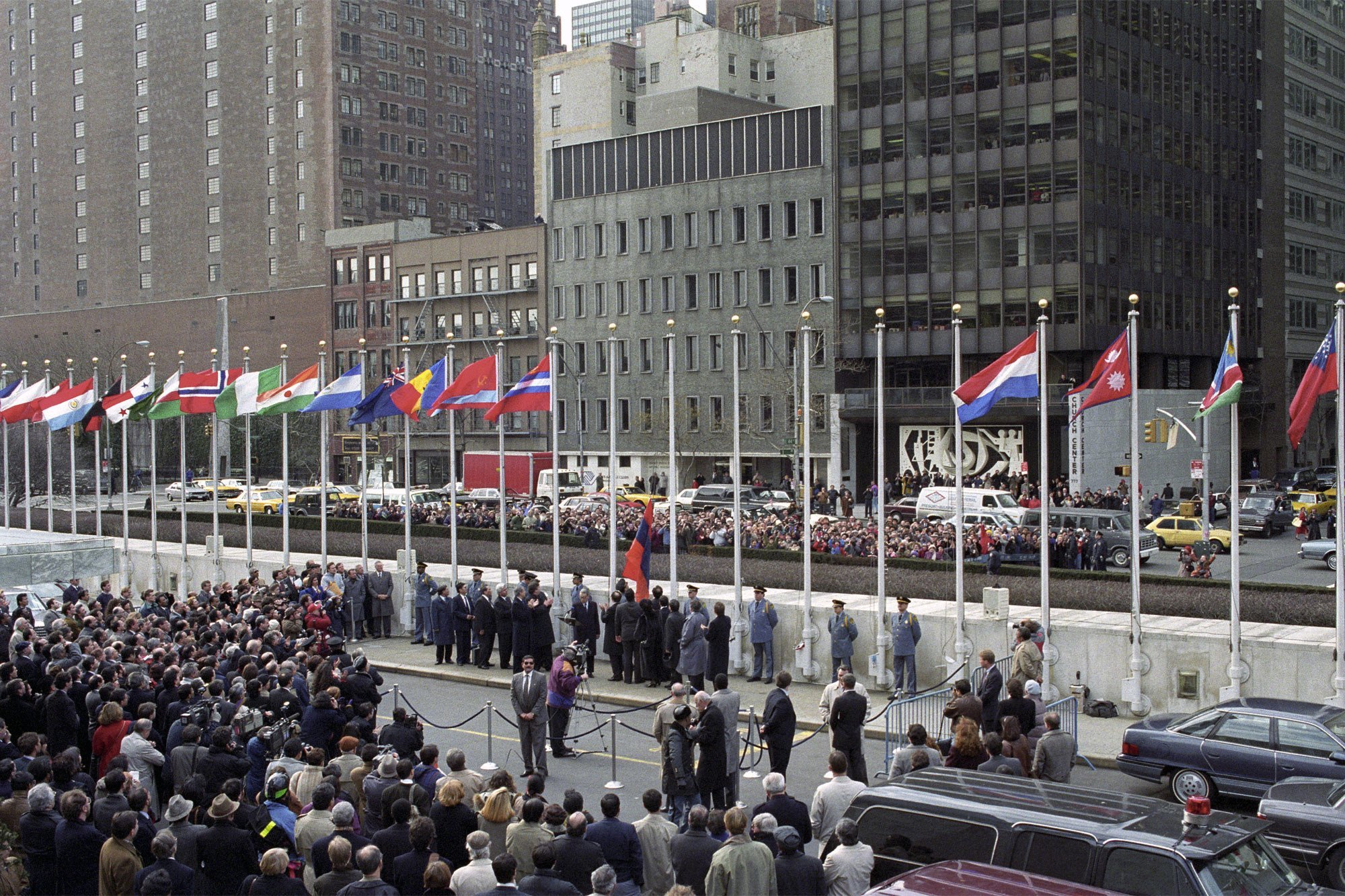 ՀՀ դրոշի բարձրացումը ՄԱԿ-ում (1992թ․ մարտ)